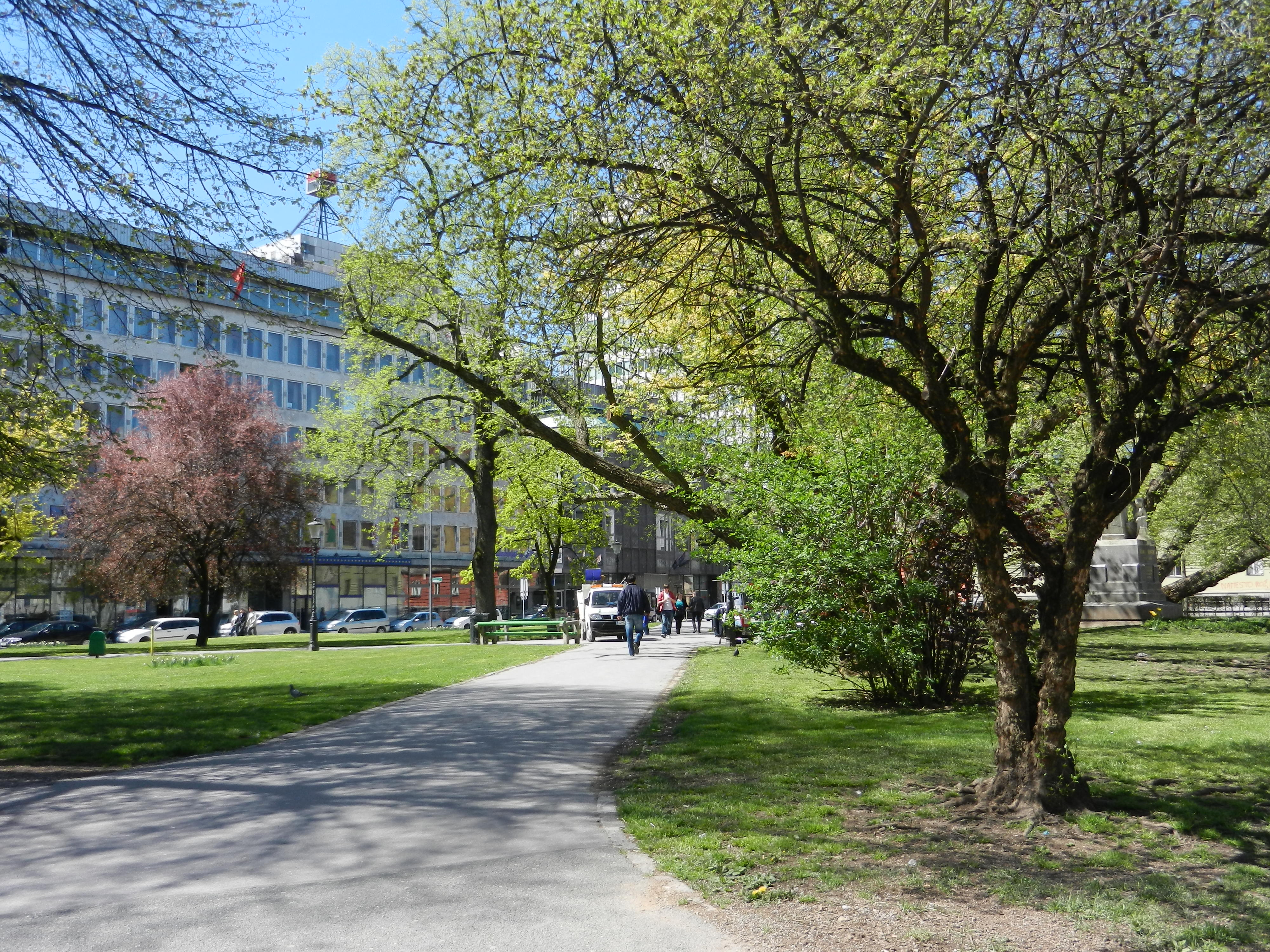 Miklošičev park v Ljubljani